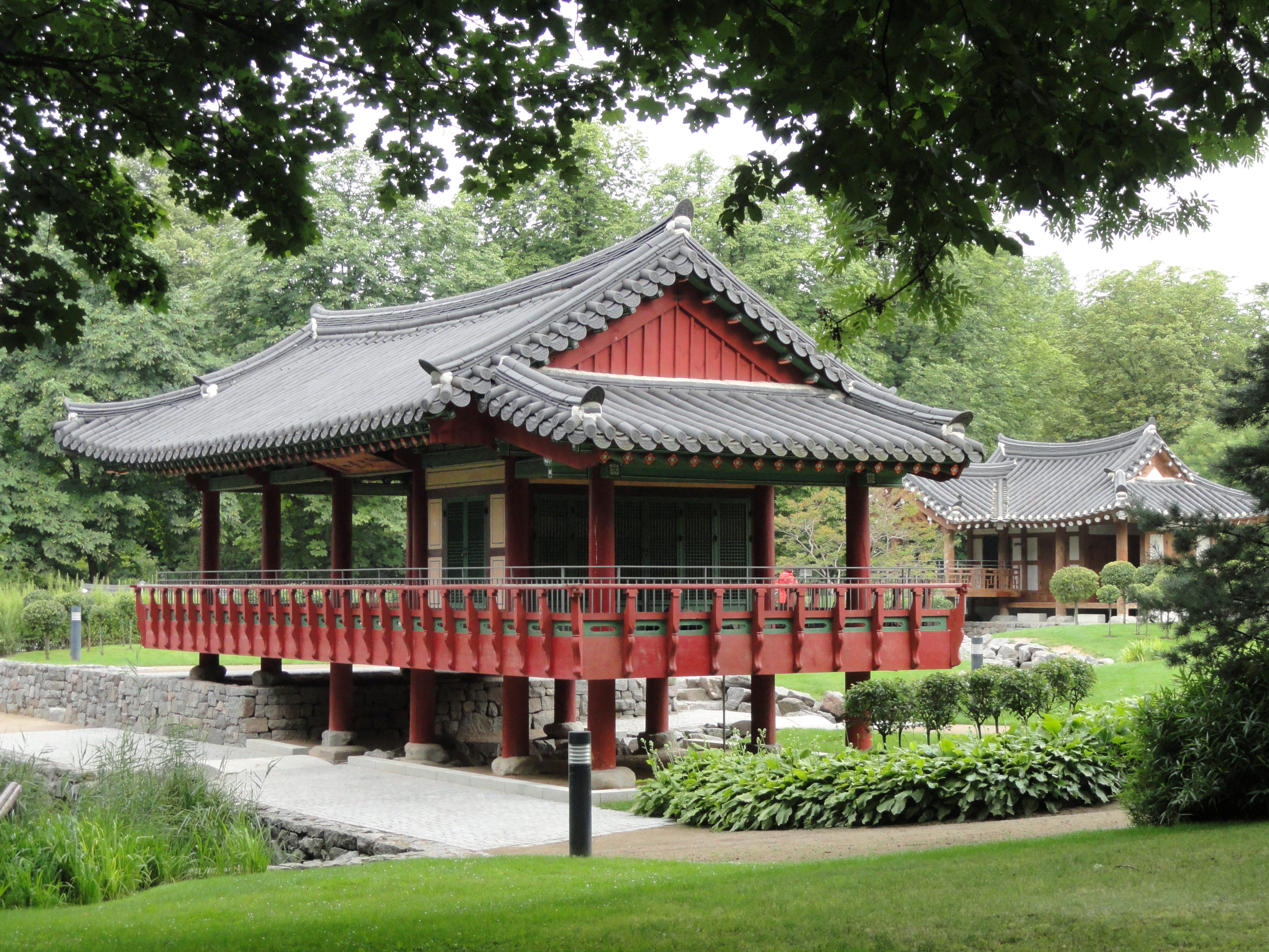 Korean Garden in Grüneburgpark, Frankfurt am Main, Germany.